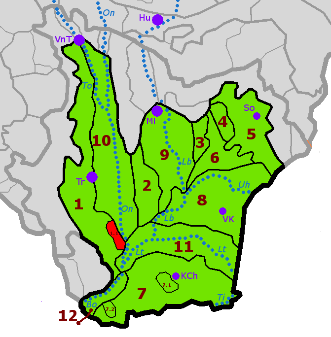 Poloha geomorfologické části Veľký vrch (červeně) v rámci členění geomorfologického celku Východoslovenská rovina (zeleně). Schematicky jsou znázorněny též nejvýznamnější vodní toky a města. Východoslovenská rovina Trebišovská tabuľa Veľký vrch Malčická tabuľa Iňačovská tabuľa Závadská tabuľa Sobranecká rovina Senianska mokraď Medzibodrocké pláňavy Chlmecké pahorky Tarbucka Kapušianske pláňavy Laborecká rovina Ondavská rovina Latorická rovina Bodrocká rovina řeky / rivers Bo – Bodrog Lb – Laborec Lt – Latorica On – Ondava Ti – Tisa To – Topľa Uh – Uh města / towns Hu Humenné KCh – Kráľovský Chlmec Mi – Michalovce So – Sobrance Tr – Trebišov VnT – Vranov nad Topľou VK – Veľké Kapušany